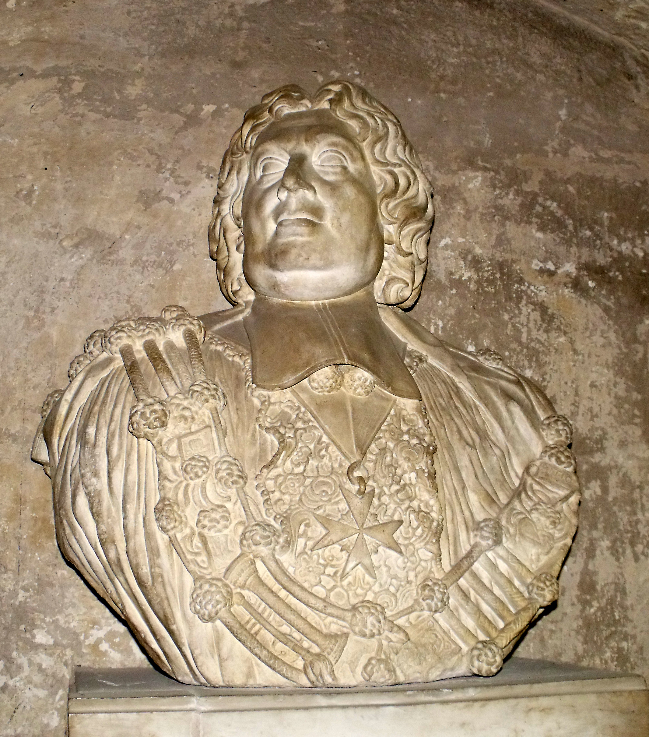 Buste de Jean-Claude Viany (1639-1726). Église Saint-Jean-de-Malte (Aix-en-Provence).